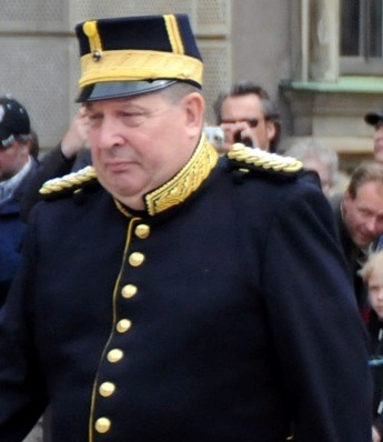 Överkommendanten i Stockholm, generallöjtnant Anders Lindström, iklädd vapenrock m/1845 på Stockholms slotts yttre borggård under ett örlogsbesök av USS Vicksburg (CG 69) den 30 april 2010.